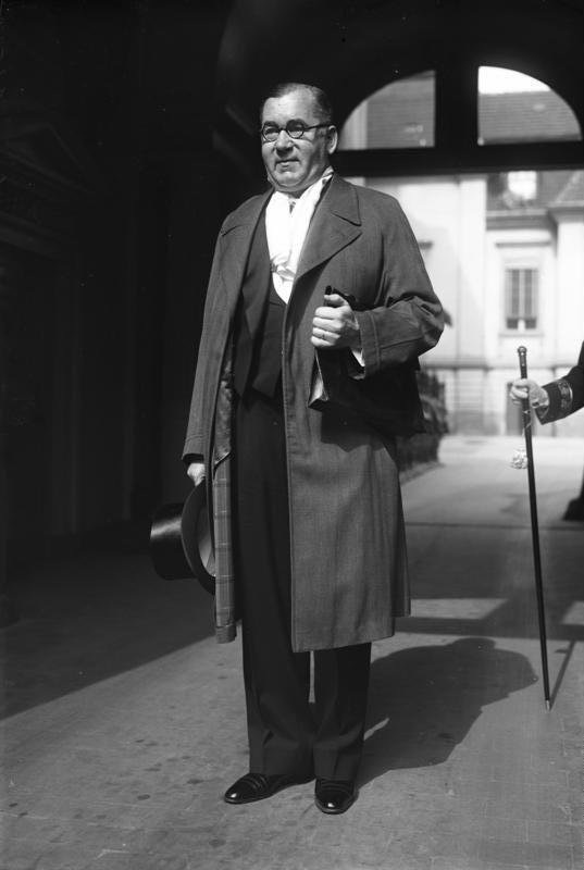 Grosser Diplomaten-Empfang beim Reichspräsidenten von Hindenburg ! Der neue lettische Gesandte in Berlin Edgar Kreewinsch, verlässt nach der Ueberreichung seines Beglaubigungsschreibens das Reichspräsidenten Palais.